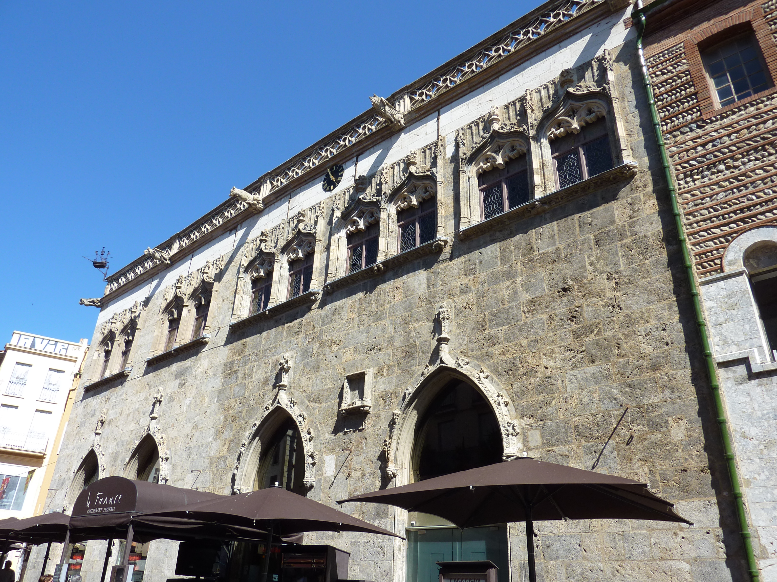 Perpignan Bâtiment de la loge de mer